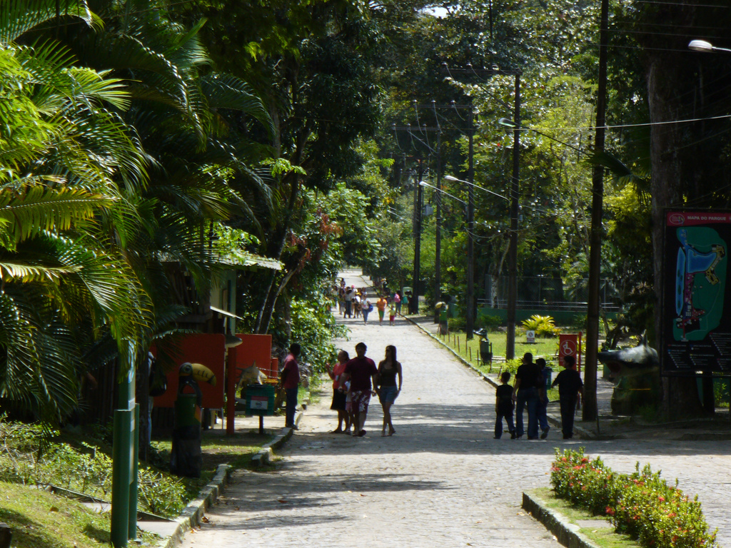 Zoológico do Parque Dois Irmãos - Recife, Pernambuco, Brasil.